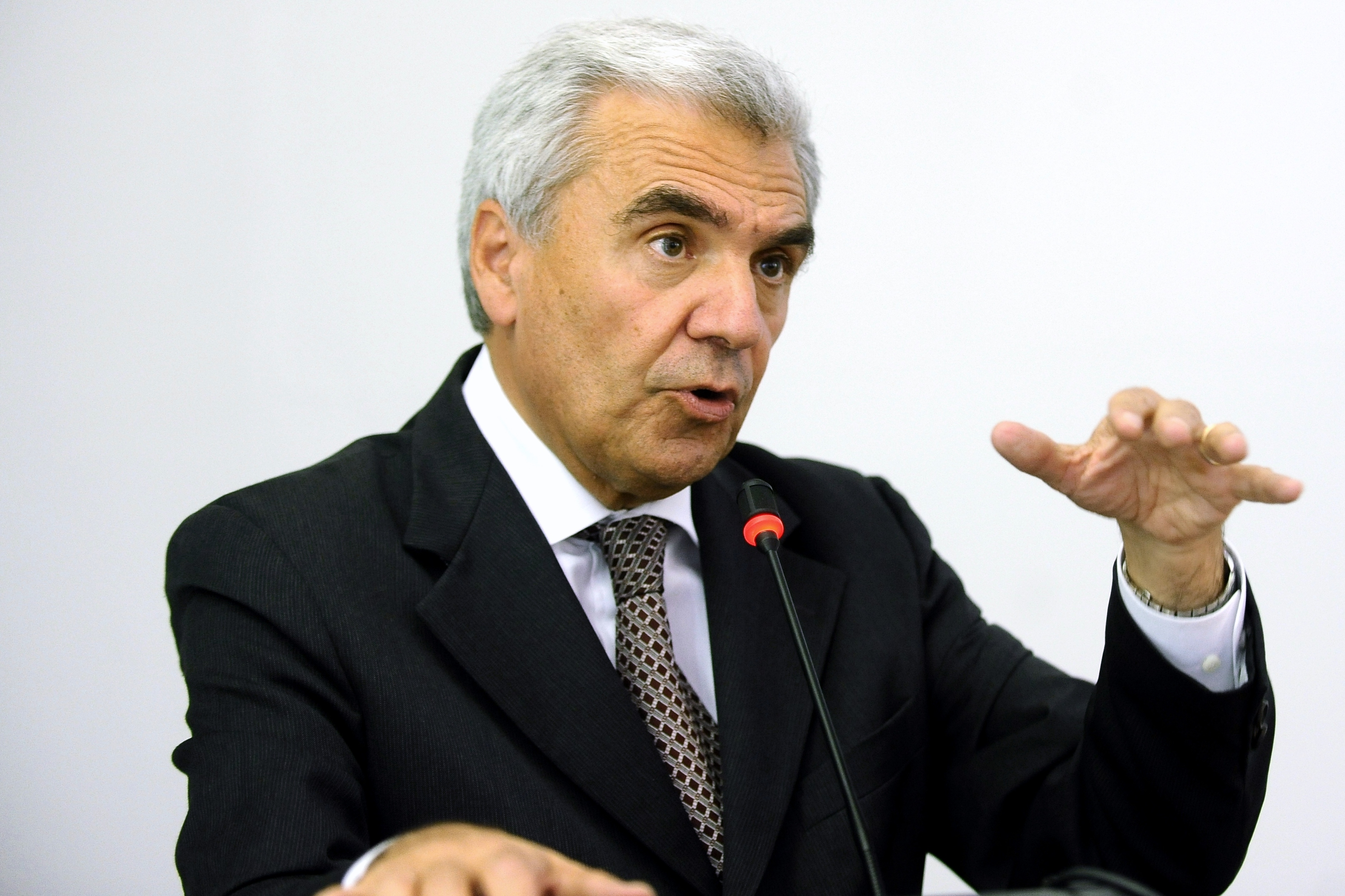 Il Ministro della Salute Renato Balduzzi al seminario "Etica e deontologia delle professioni sanitarie" a Trento.